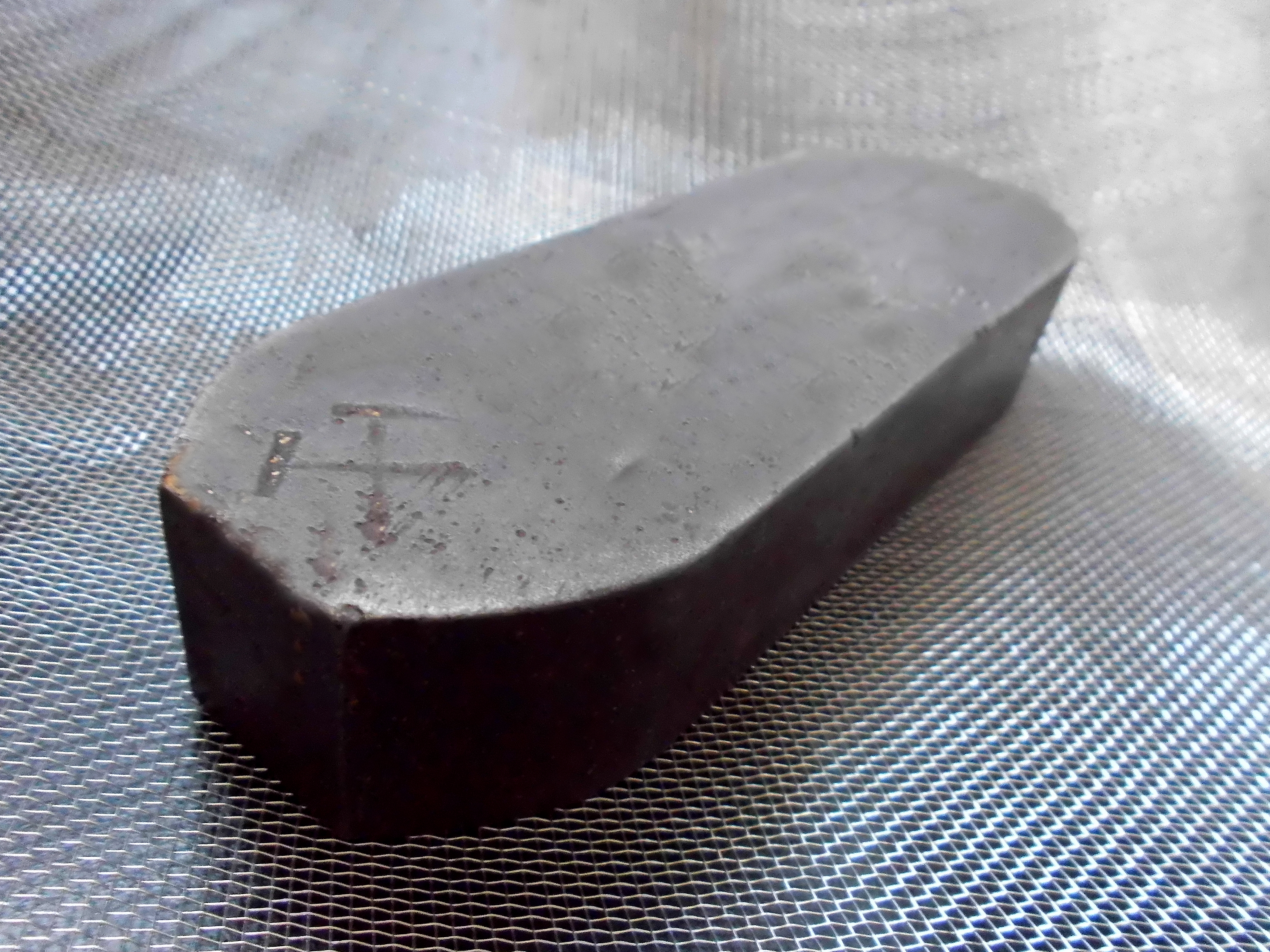 000001_Image_Brikett aus Stahl als Ehrenzeichen in der DDR hergestellt und als "Auszeichnung" überreicht.